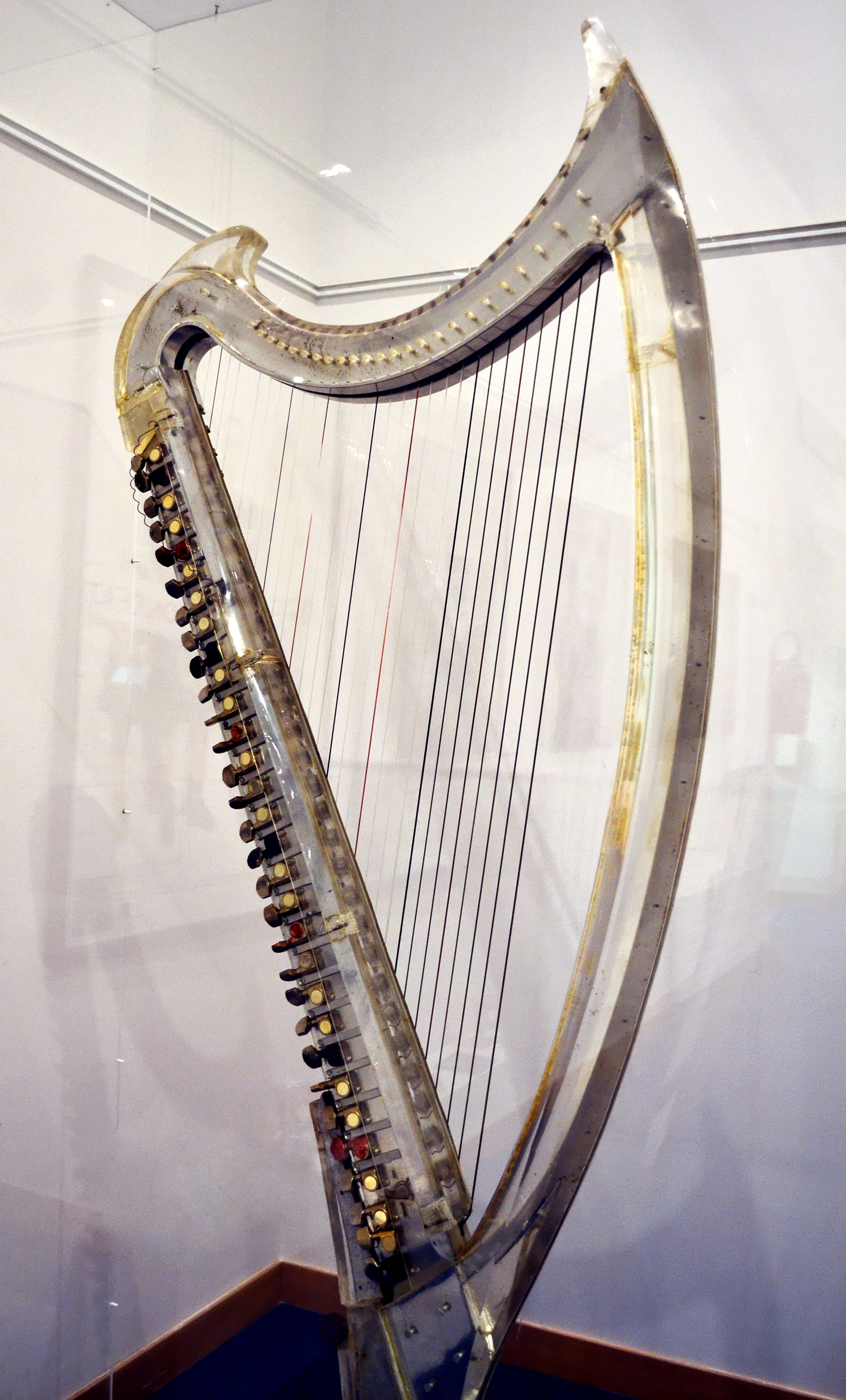 La Telenn Strink ("harpe de cristal" en plexiglas) conçue par Leo Goas-Straaijer entre 1986 et 1987 à partir d'un dessin d'Alan Stivell. Le harpiste l'utilise sur scène pendant une quinzaine d'années. Elle est exposée durant le mois de novembre 2015 à la médiathèque de Plérin-sur-mer (22) dans le cadre de l'exposition ROK par Frank Darcel (producteur de l'album Back to Breizh).